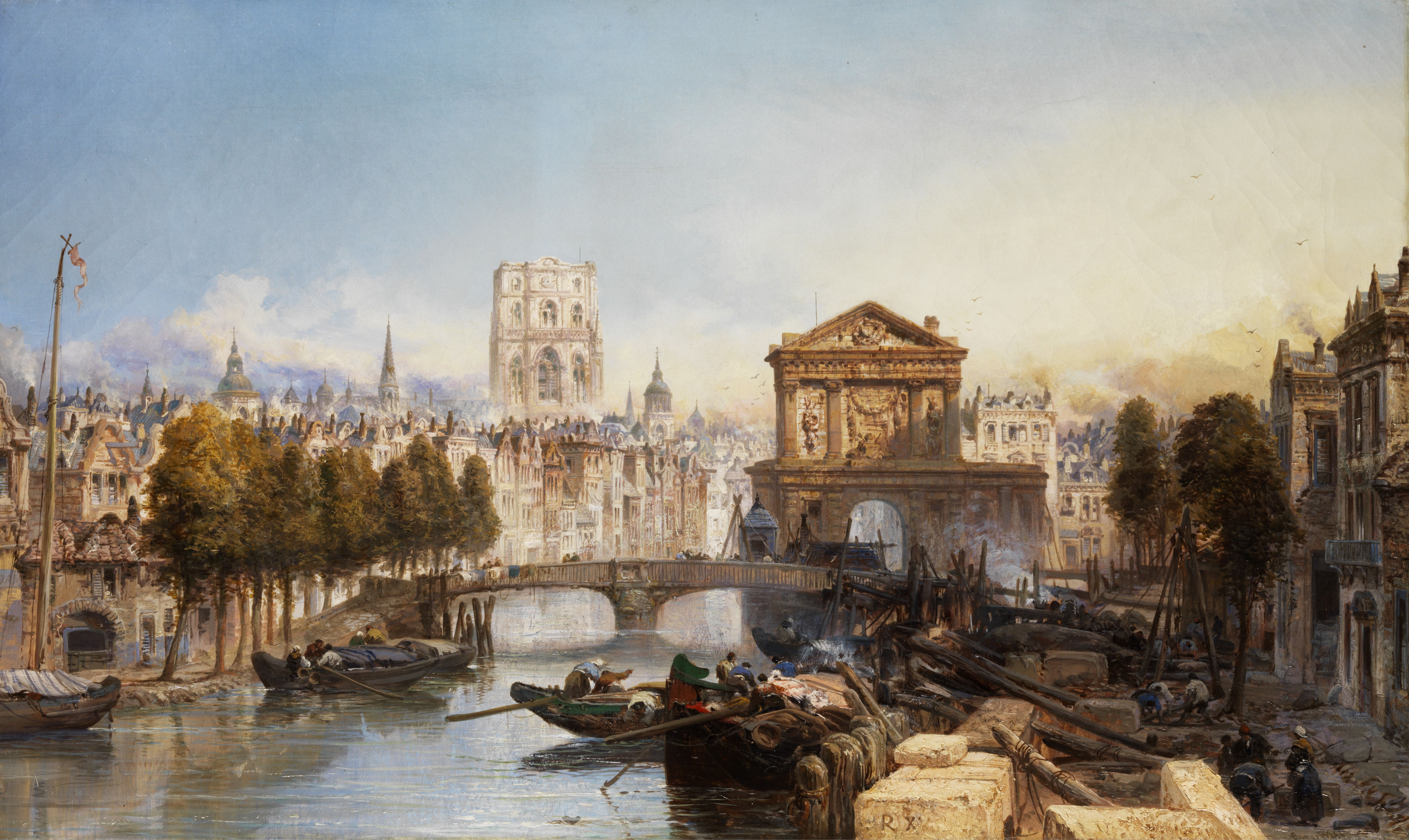 Vedute von Rotterdam. Öl auf Leinwand. 75 x 126 cm. Rechts unten signiert, weiterhin auf der Rückseite der Leinwand signiert, ortsbezeichnet und datiert (Datum von Hampel nicht angegeben).